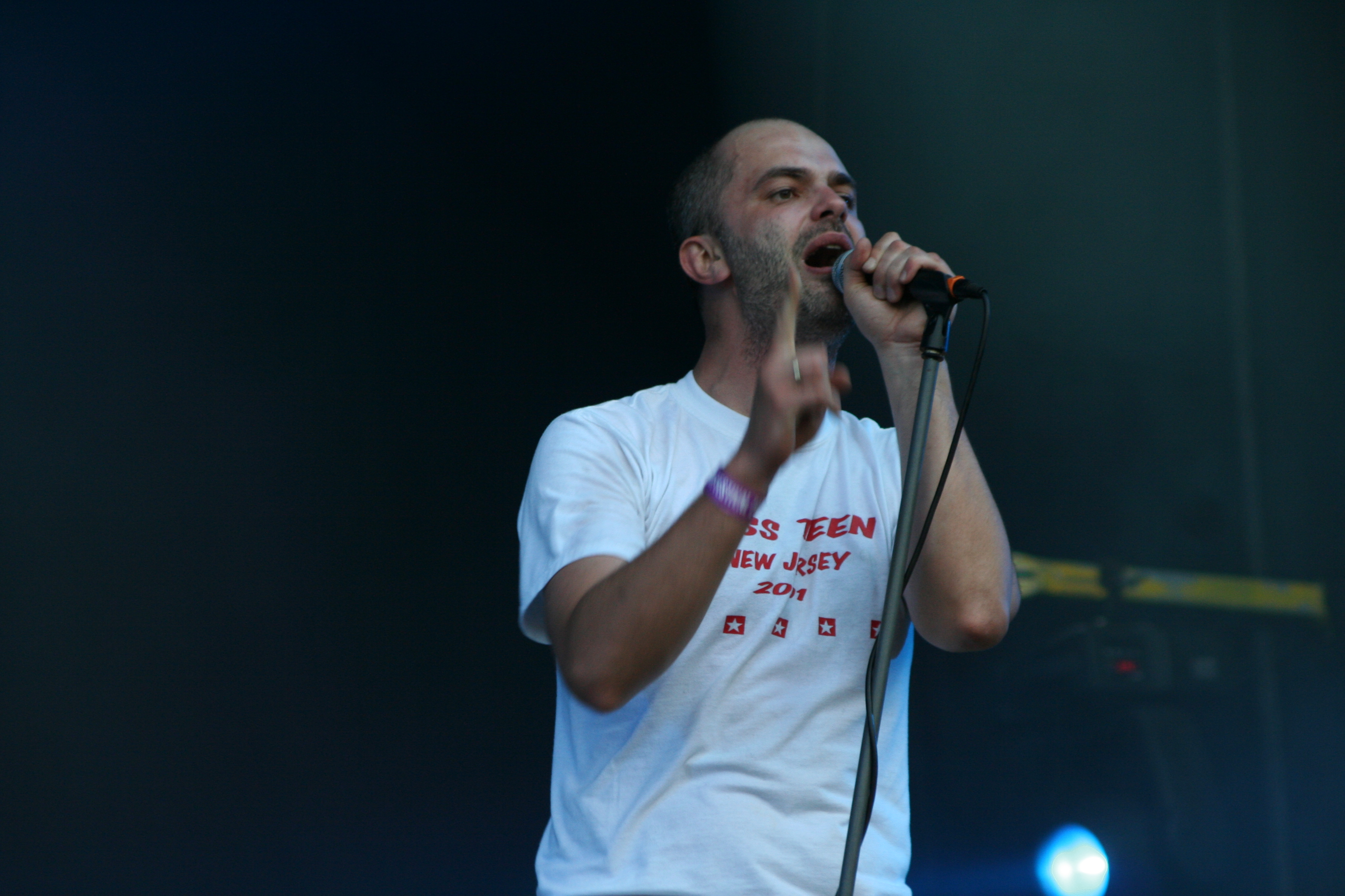 Off Festival, Mysłowice - pubiczność podczas koncertu Dezertera